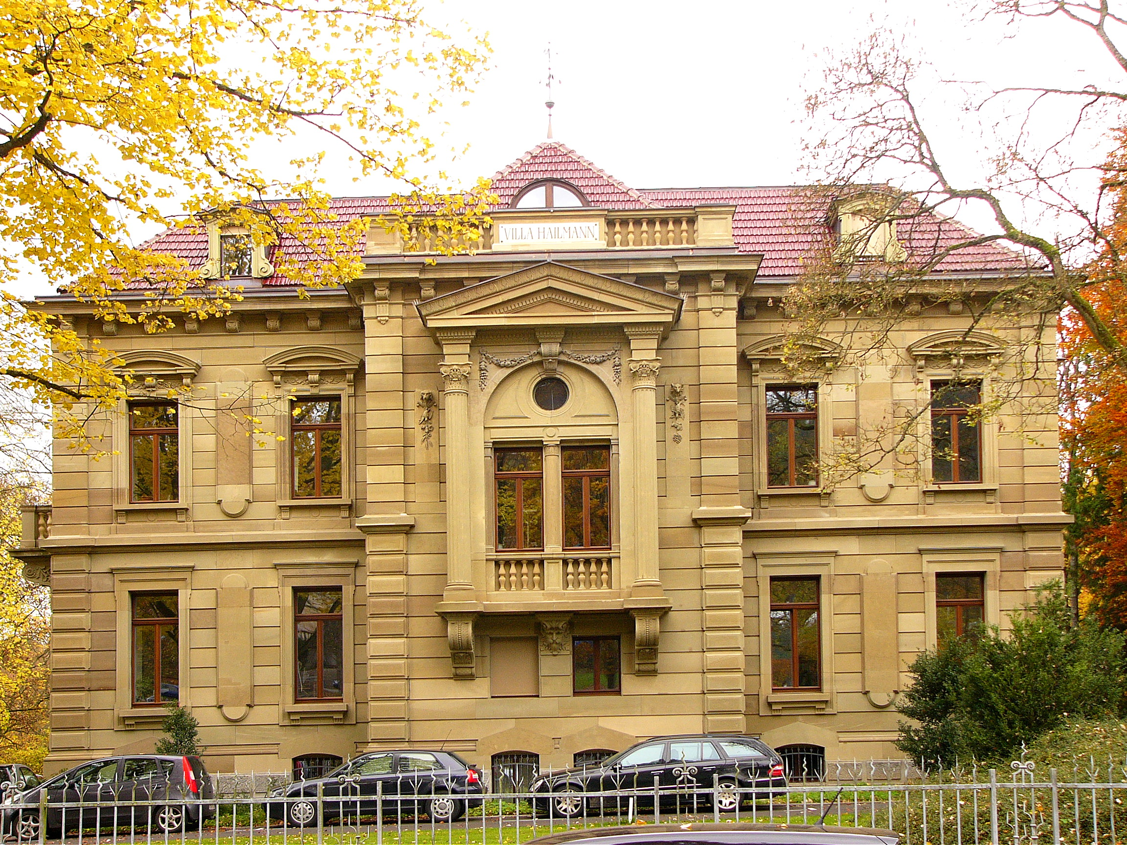 Ehemals Villa Hailmann; jetzt Wasserwirtschaftsamt, zweigeschossiger Sandsteinquaderbau mit abgeschnittenem Walmdach und Mittelrisaliten, der östliche mit Ädikulamotiv, in Formen der Neorenaissance, von Antony Krafft, 1901-03.This is a photograph of an architectural monument.